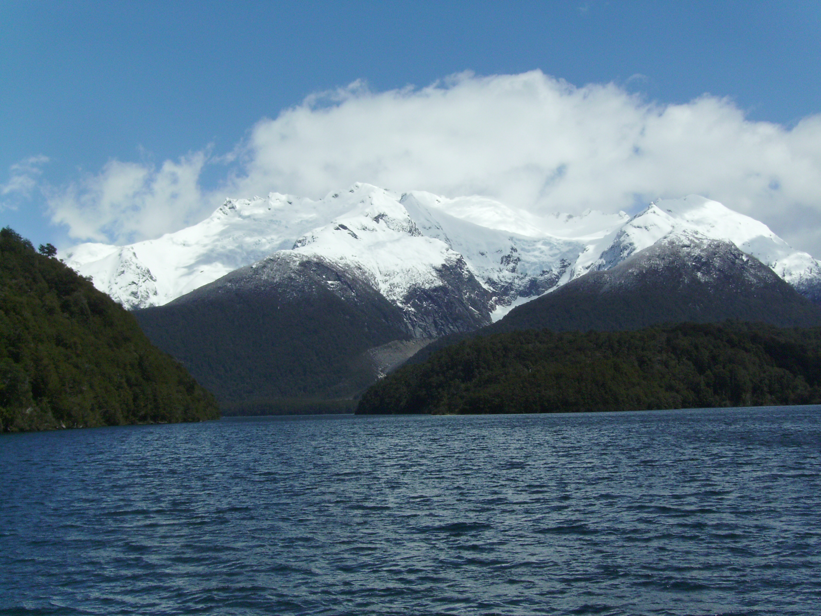 Cerro y glaciar Torrecillas - Lago Menéndez - Parque Nacional Los Alerces - Chubut - Argentina